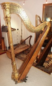 Erad Doppelpedal-Konzertharfe Stil Gotik BJ 1905